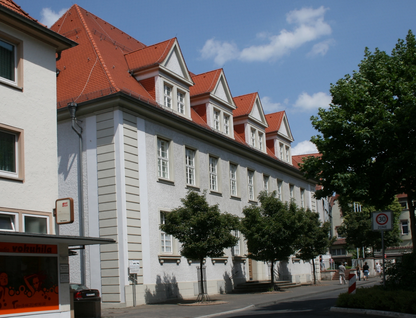 Amtsgericht Bad Hersfeld (Altbau) in Bad Hersfeld.